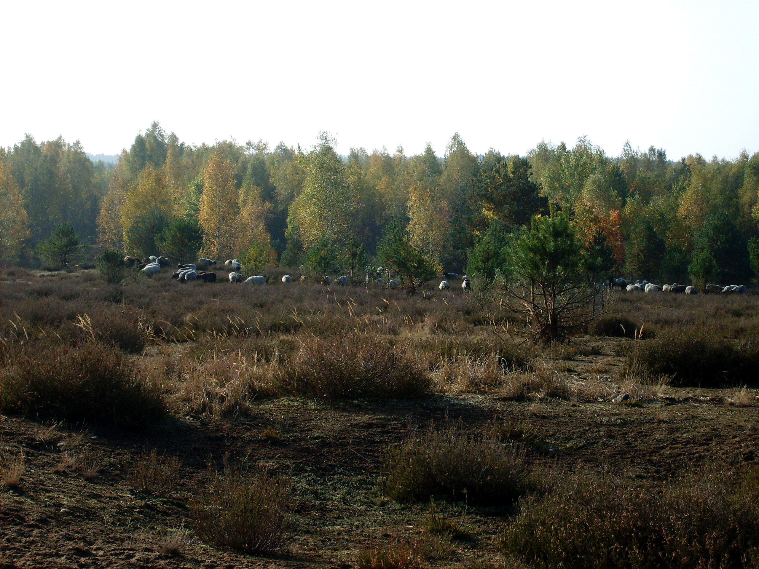 Schafe im NSG Forsthaus Prösa